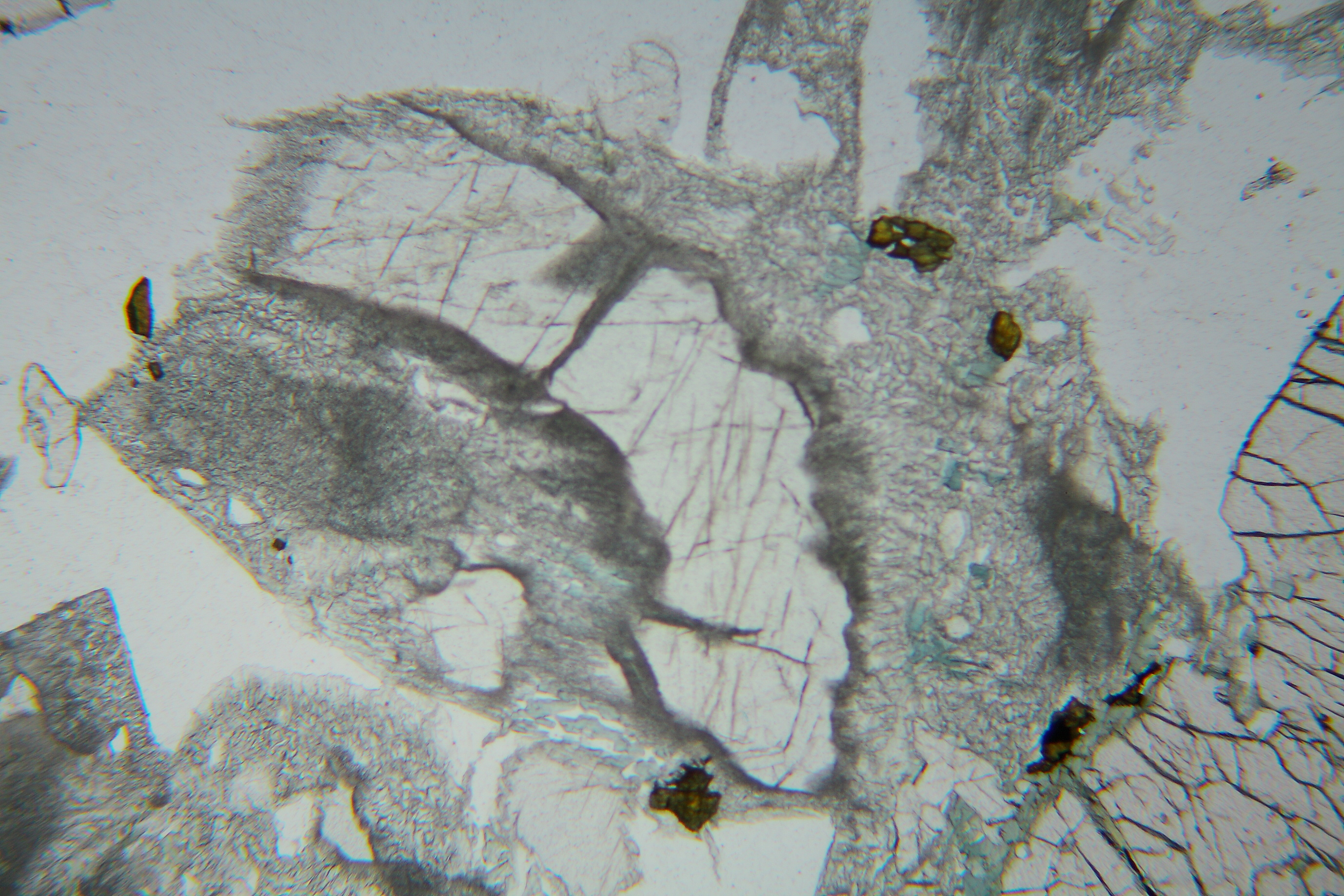 Partiell retrograd überprägter Eklogit von Förstenreuth (Münchberger Gneismasse) (Dünnschliff, LPL): In der Mitte reliktisch erhaltener Omphacit, umgeben von symplektitischen Verwachsungen aus Diopsid und Plagioklas. Rechts am Bildrand Granat (mit hohem Relief).